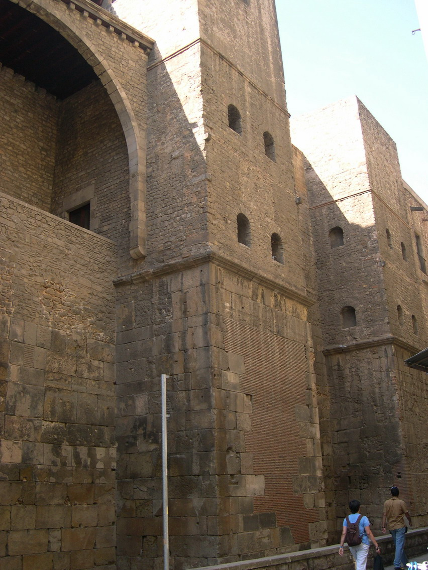 Torres de la muralla romana al carrer del Sots-Tinent Navarro.